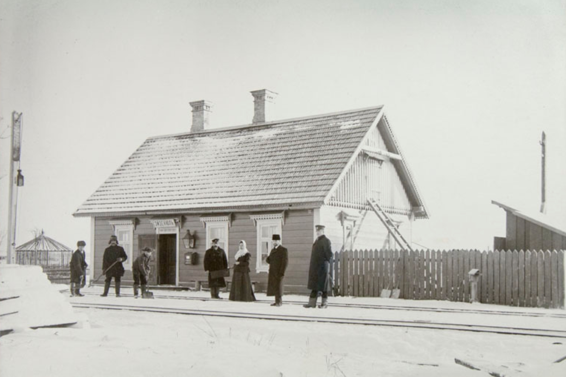 Õisu jaamaesine XX sajandi alguses - hiljem (1930. aastatel) nimetati ümber Kaarli jaamaks.